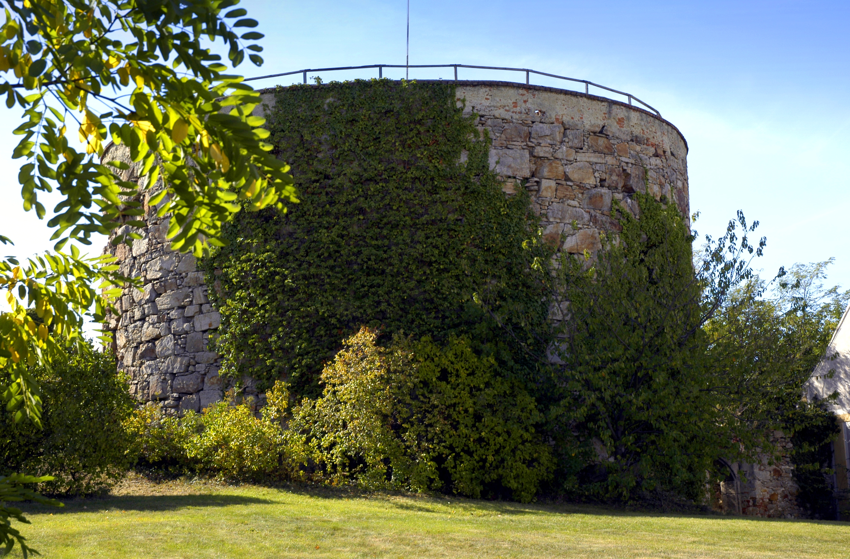 Schrattenthal - Schloss / Hungerturm Dieses Bild wurde anlässlich des österreichischen Tags des Denkmals 2012 in Niederösterreich eingereicht.